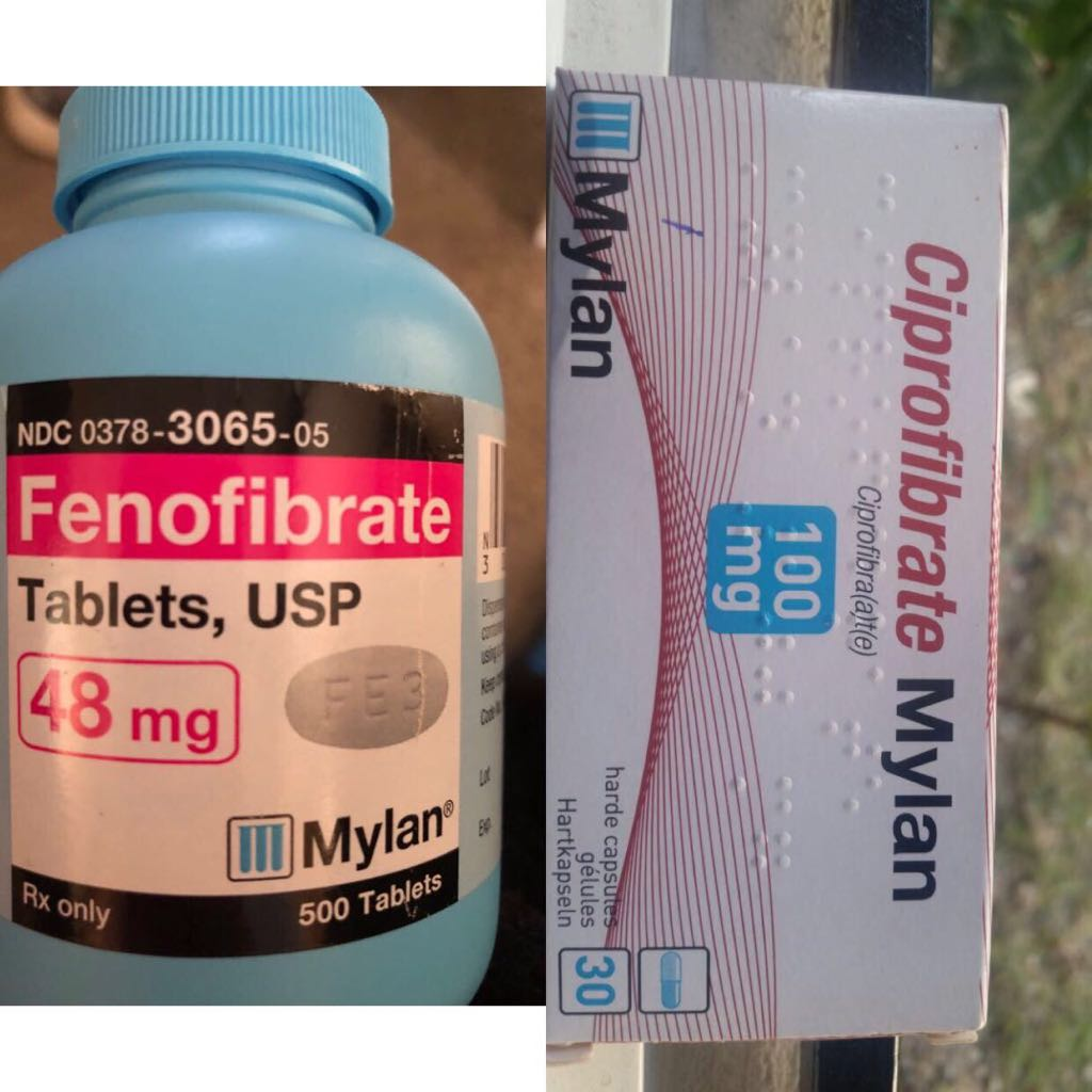 son de los mejor te pueden ayudar